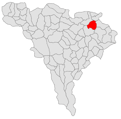 Categorie:Hărţi ale judeţului Alba